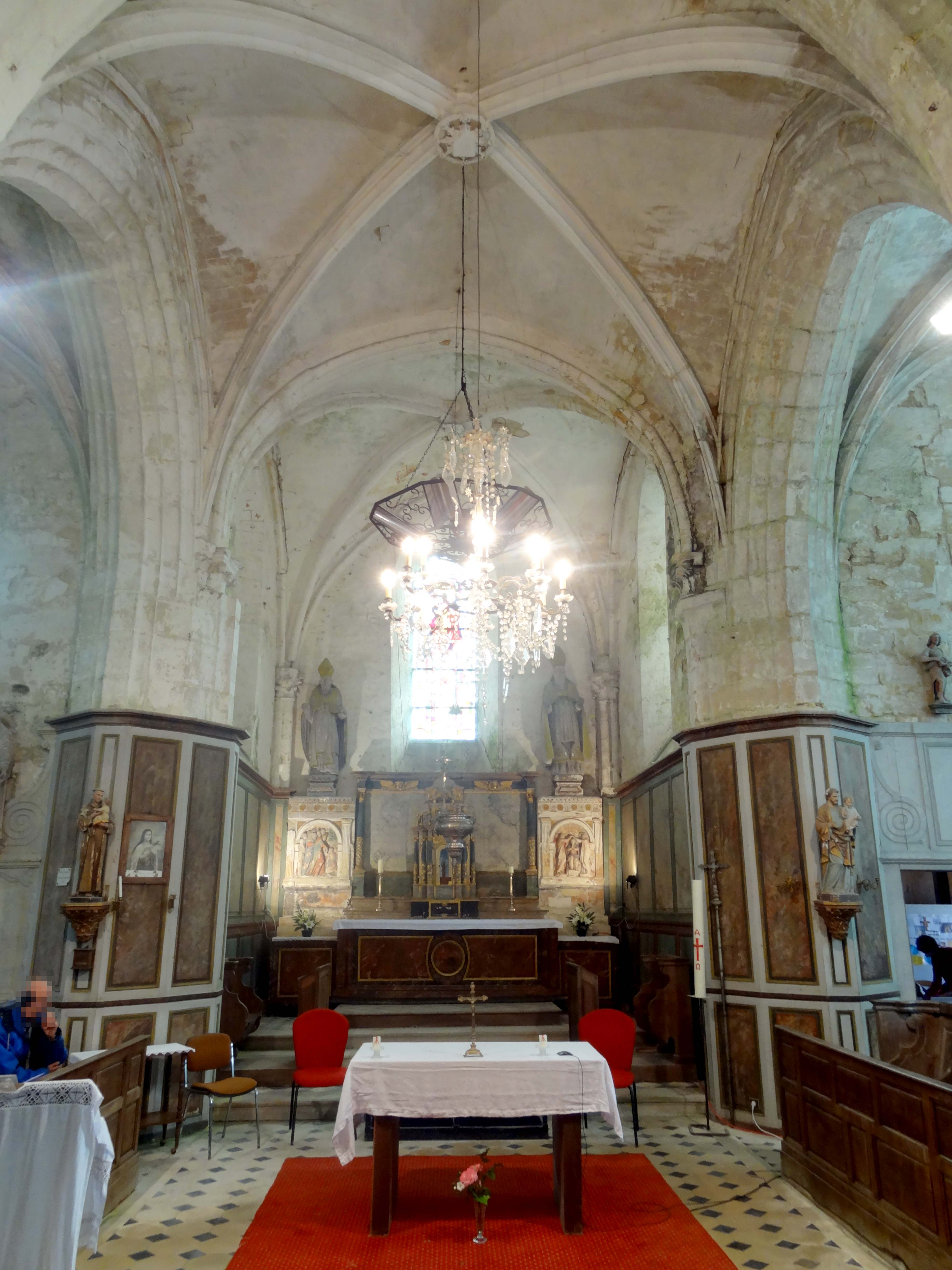 Intérieur de l'église - voir titre.